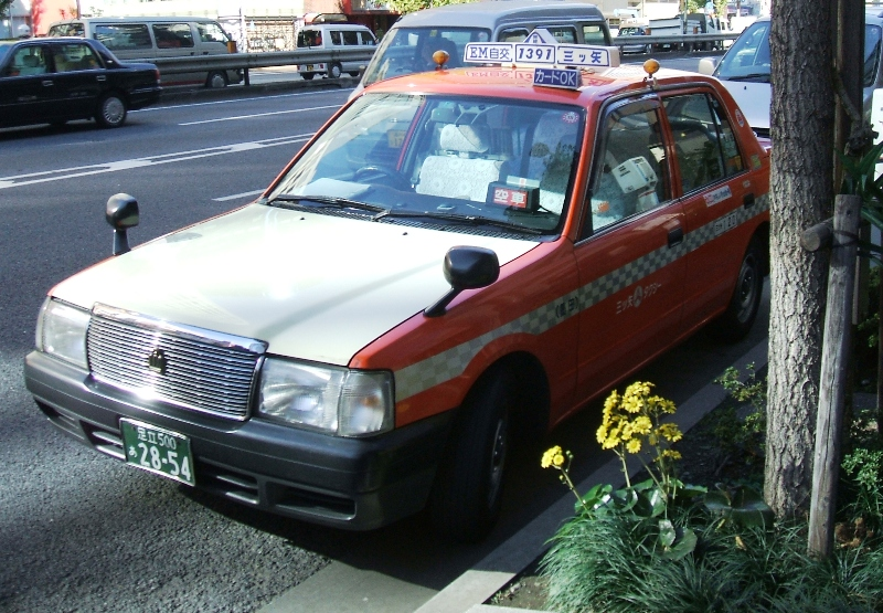 三ツ矢観光自動車のタクシー（撮影当時はEM自交無線とチェッカー無線に加盟）